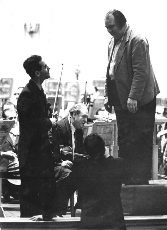 Zentralbild-Kemlein Bn-Th 29.3.1956 Igor Oistrach in Berlin begeistert gefeiert Der vierundzwanzigjährige sowjetische Geiger Igor Oistrach eröffnete am 28.3.1956 mit einem Konzert in der Deutschen Staatsoper zu Berlin seine Tournee durch die Deutsche Demokratische Republik. Der Künstler, Sohn und Schüler des berühmten Violinisten David Oistrach wurde bei seinem ersten Konzert in Deutschland von den Zuhörern begeistert gefeiert. (Näheres siehe ADN vom 18.3.1956) UBz: Igor Oistrach (links) im Gespräch mit dem Dirigenten der Staatskapelle Berlin Nationalpreisträger Franz Konwitschny.